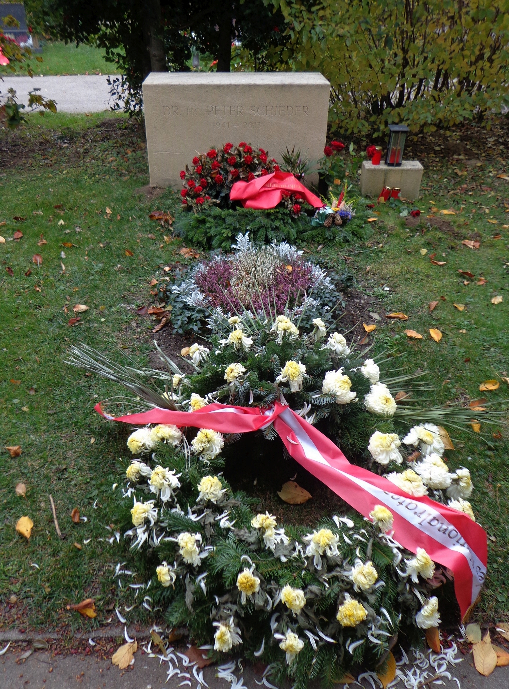 Wiener Zentralfriedhof - Gruppe 14 C, Ehrengrab von Peter Schieder